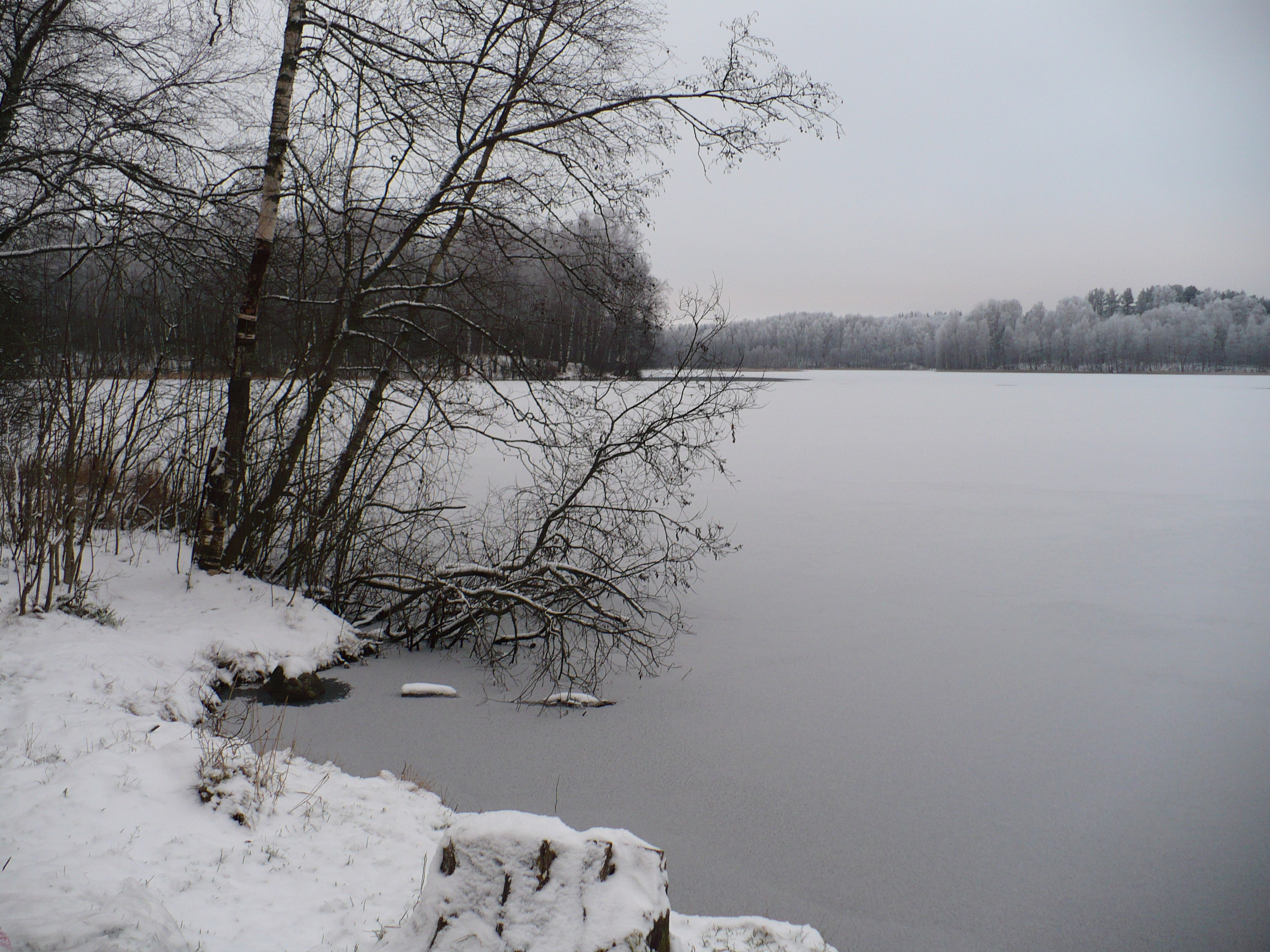 Ozero zimoi